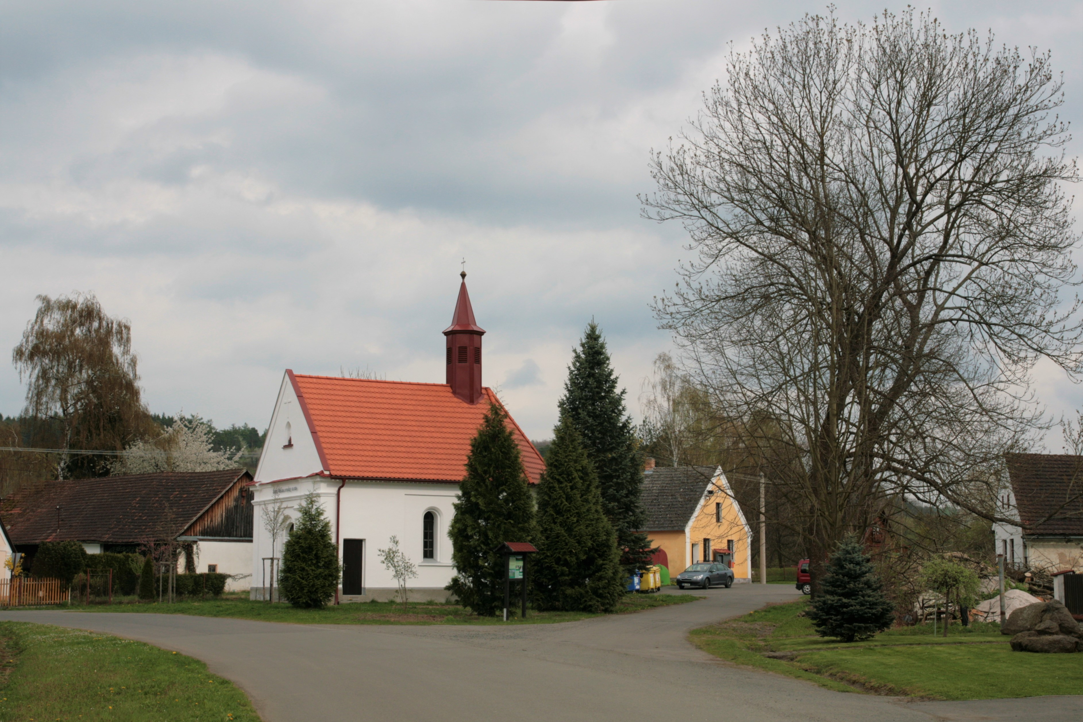 Vesnice Třebýcinka, část města Švihov v okrese Klatovy. Kaple svatého Václava na návsi. Průhled ulicí na náves od západu.